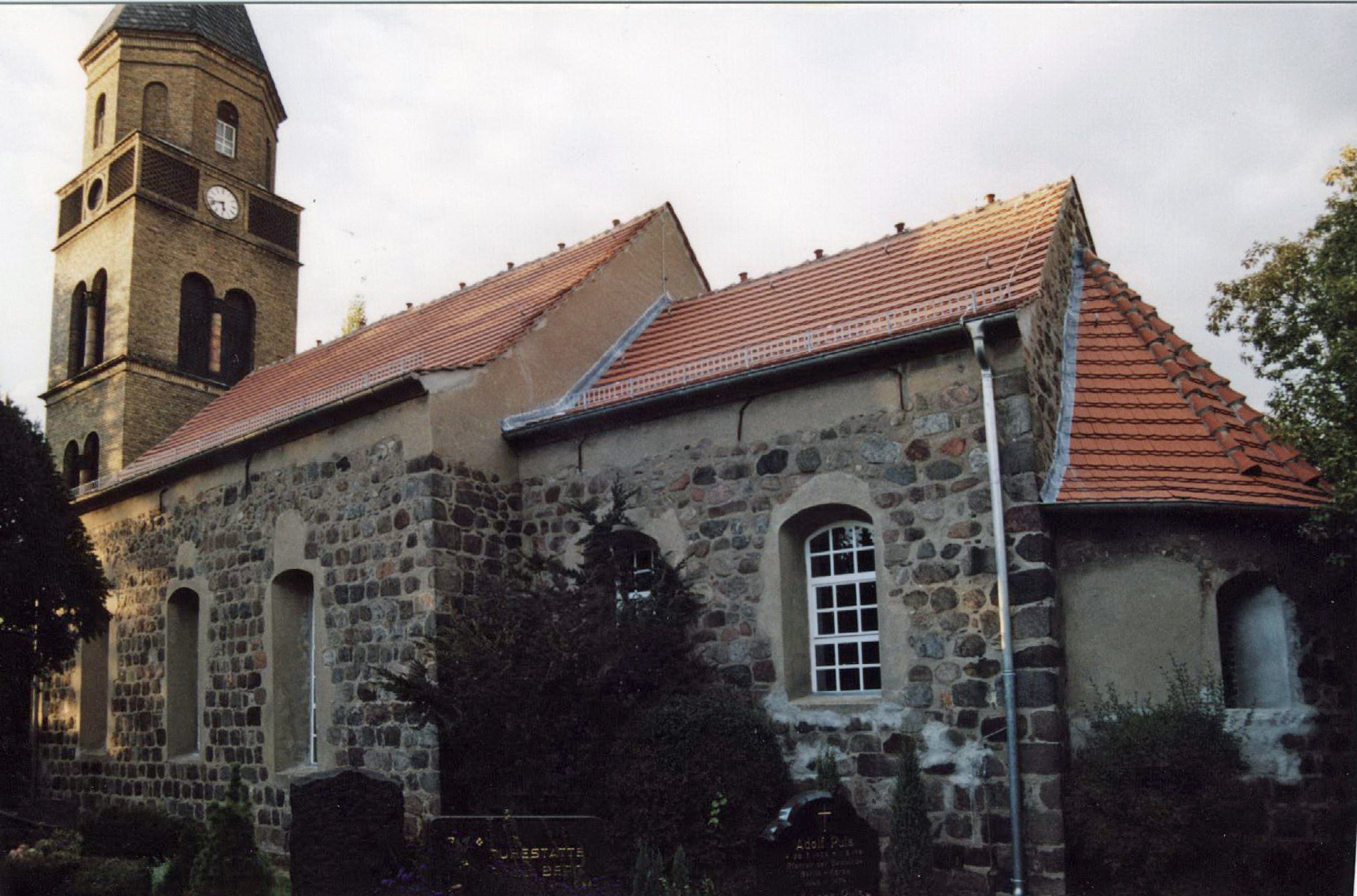 Die Dorfkirche Karow von Südosten im Jahr 2003